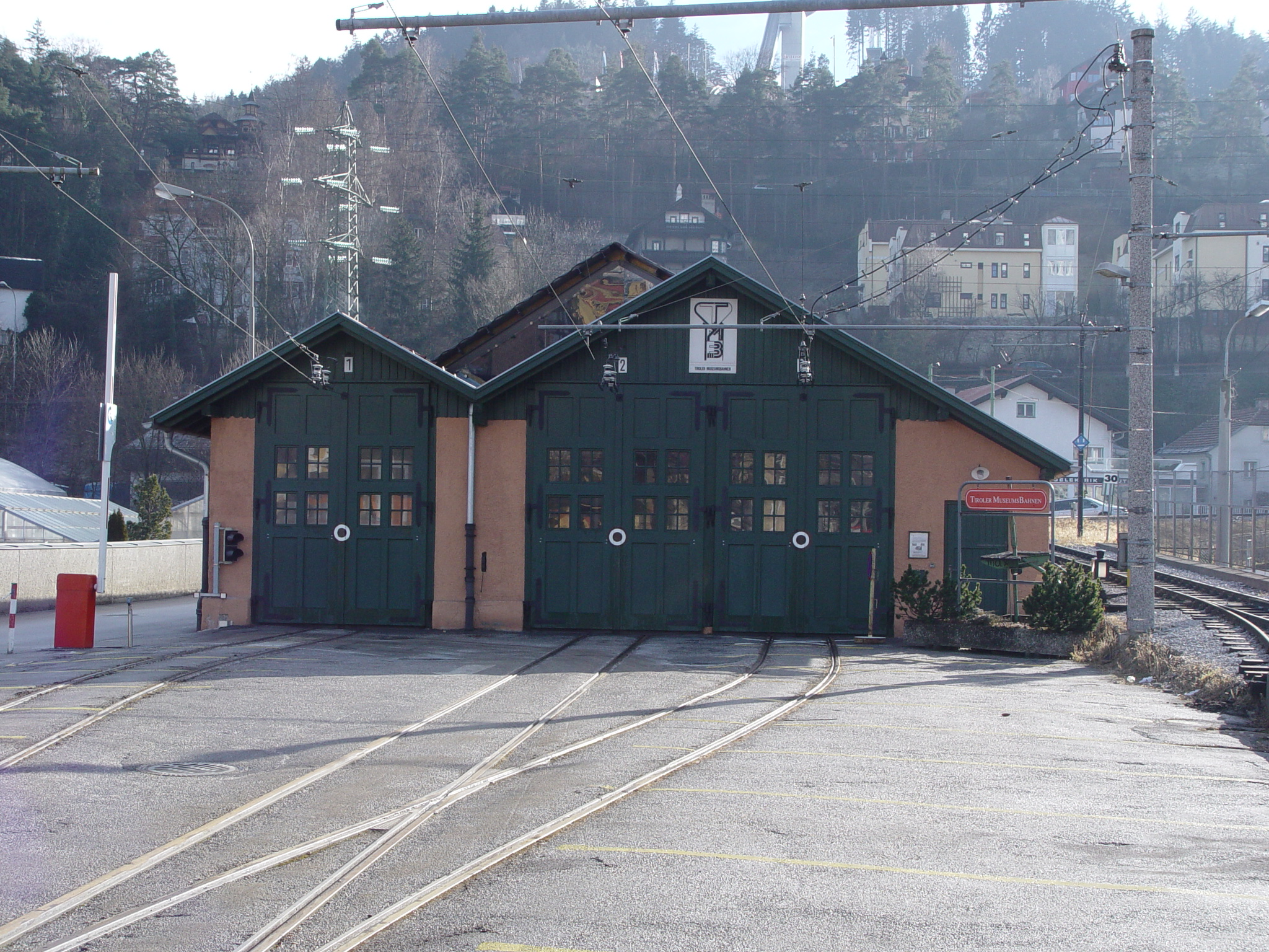 Remise am Stubaitalbahnhof. Heute befinden sich darin die Fahrzeuge der Tiroler Museumsbahnen This media shows the remarkable cultural object in the Austrian state of Tyrol listed by the Tyrolean Art Cadastre with the ID 68583. (More images on Commons)